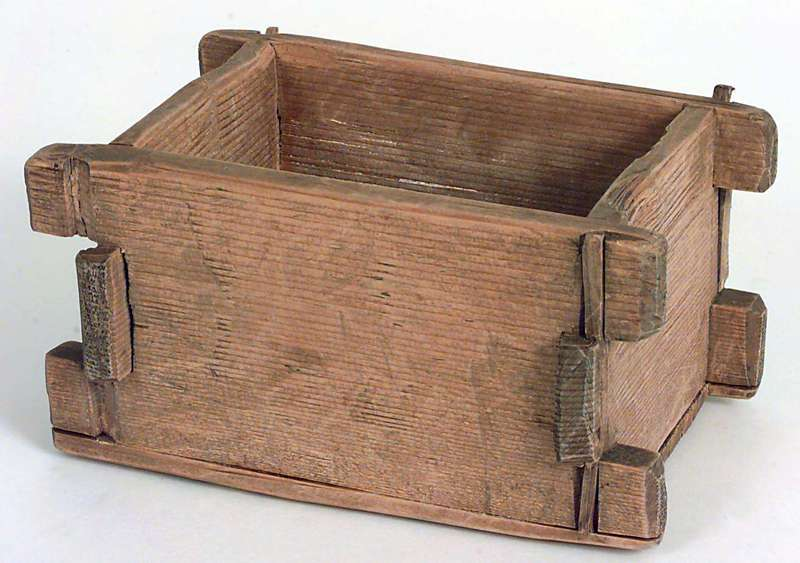 Osteform fra Nes i Akershus. Lengde 20 cm. Foto Anne-Lise Reinsfelt / Norsk Folkemuseum, NFL.15320.